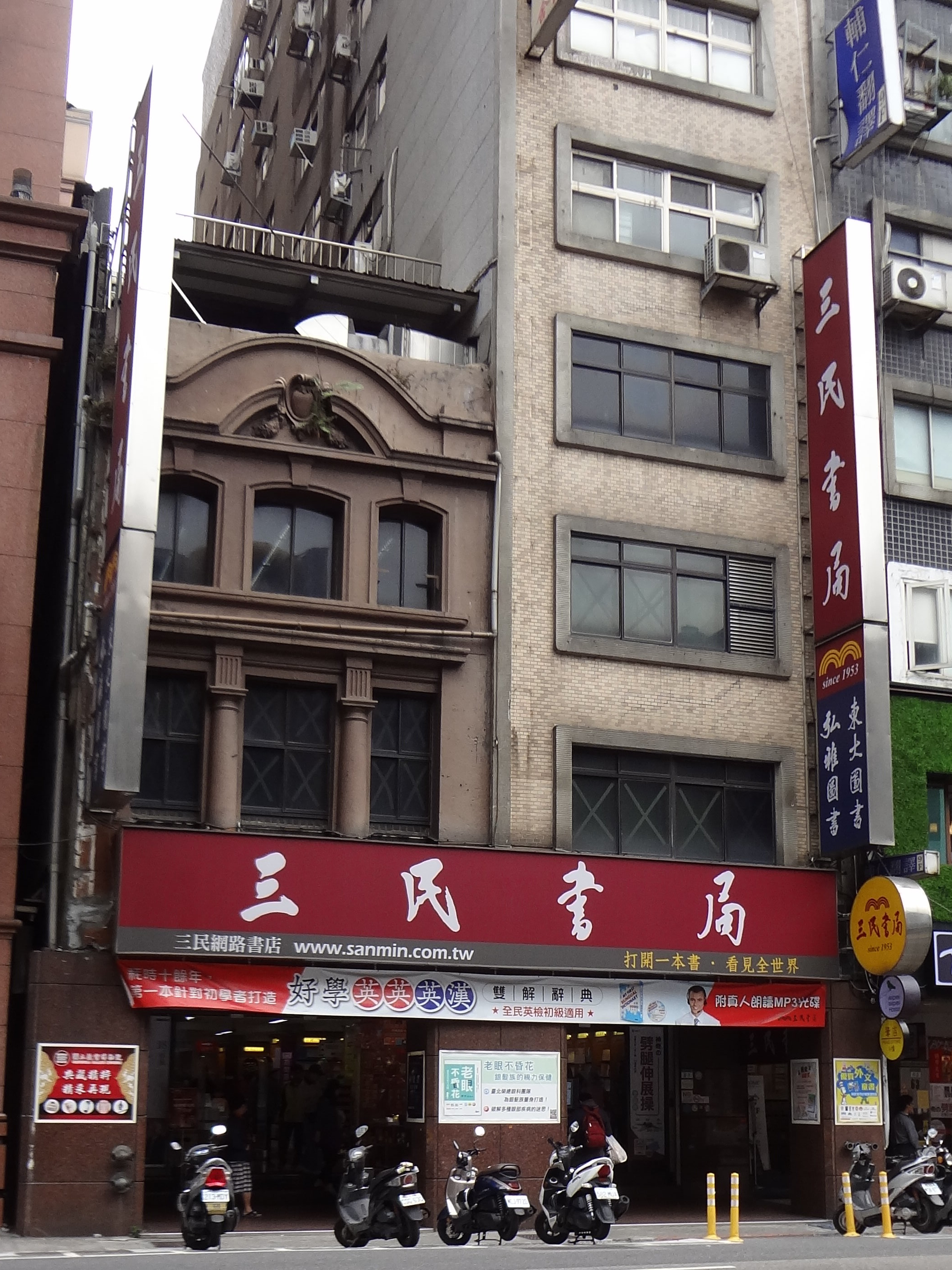 三民書局重南門市。